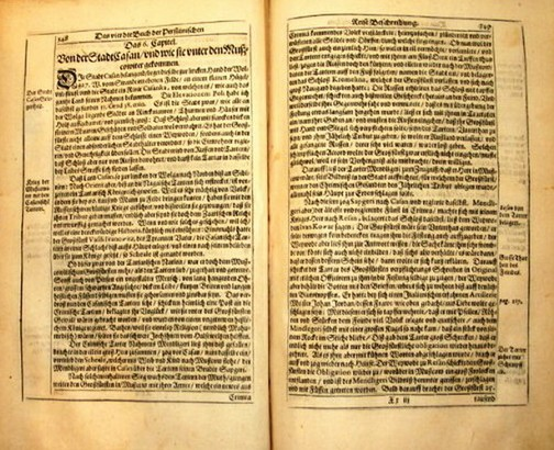 Глава из книги Адама Олеария «Описание путешествия голштинского посольства в Московию и Персию».